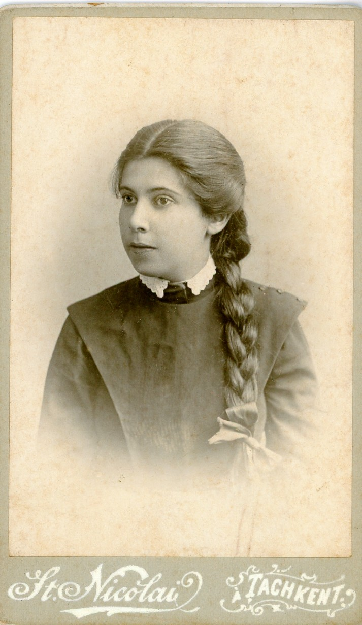 הלנה כגן, טשקנט 1904